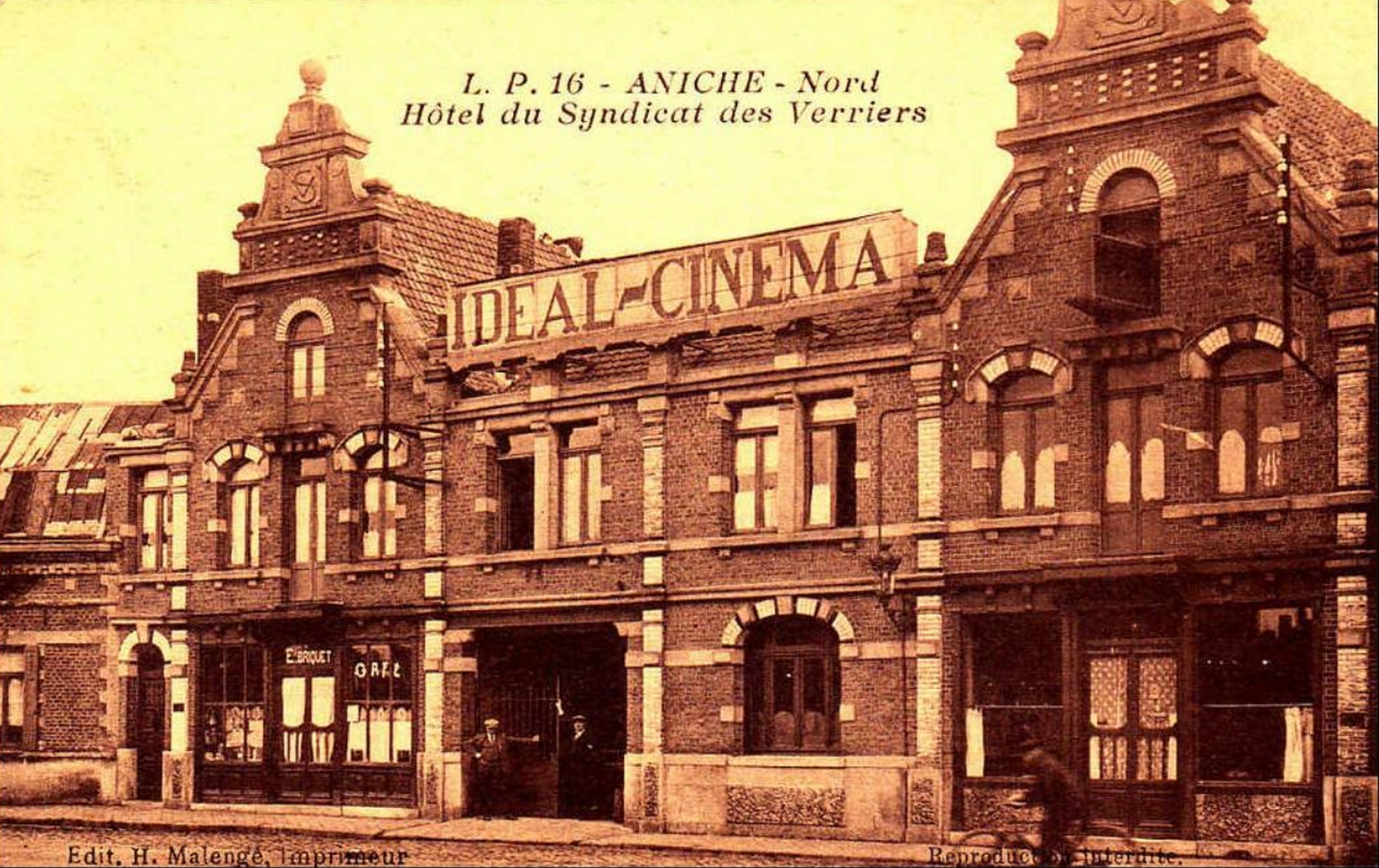 Hôtel du Syndicat des Verriers, Aniche, Nord, Nord-Pas-de-Calais, France.